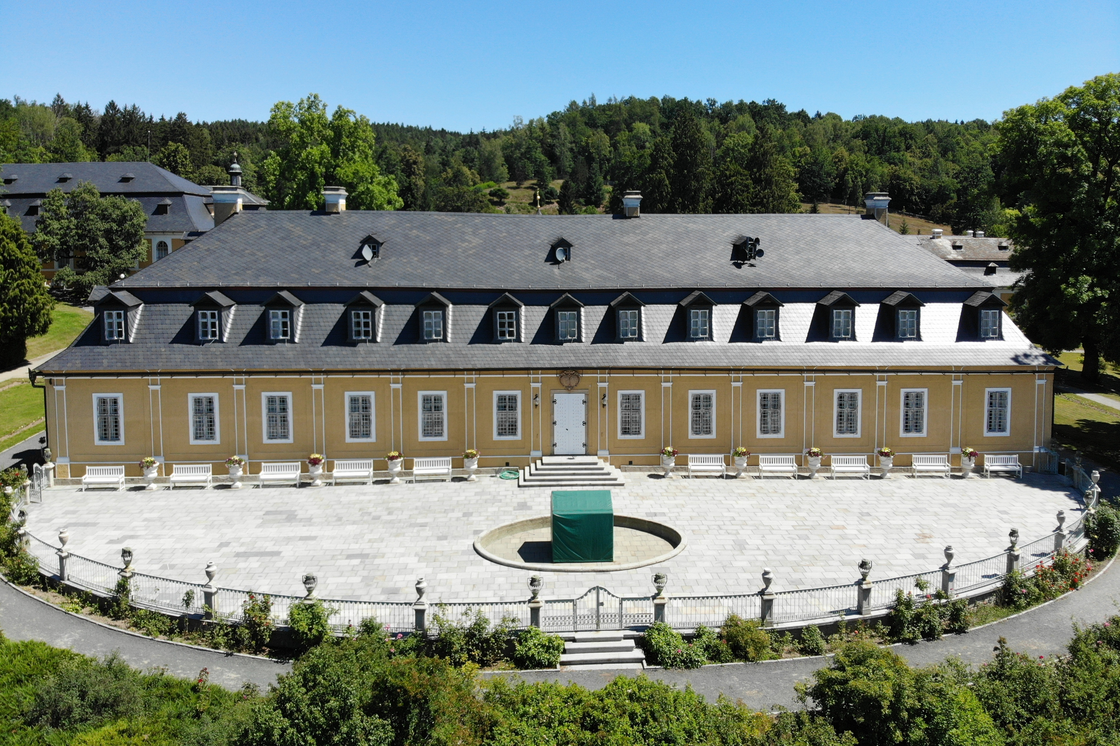 Zámek kozel z ptačí perspektivy Project: Fotíme Česko